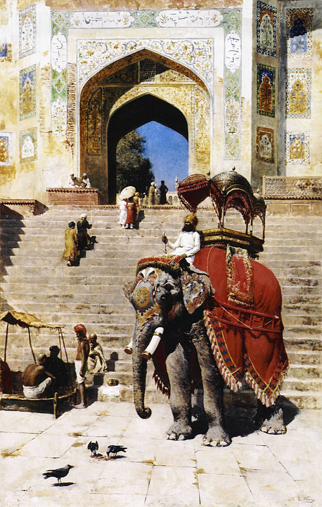 Royal Elephant